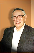 הרב ד"ר שלמה זנוויל כהנא